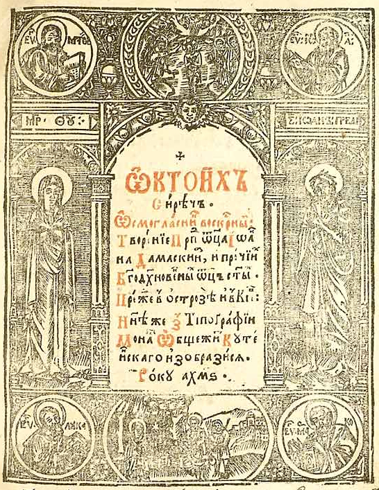 «Октоих». Кутеинская типография. Из библиотеки Троице-Сергиевой лавры.